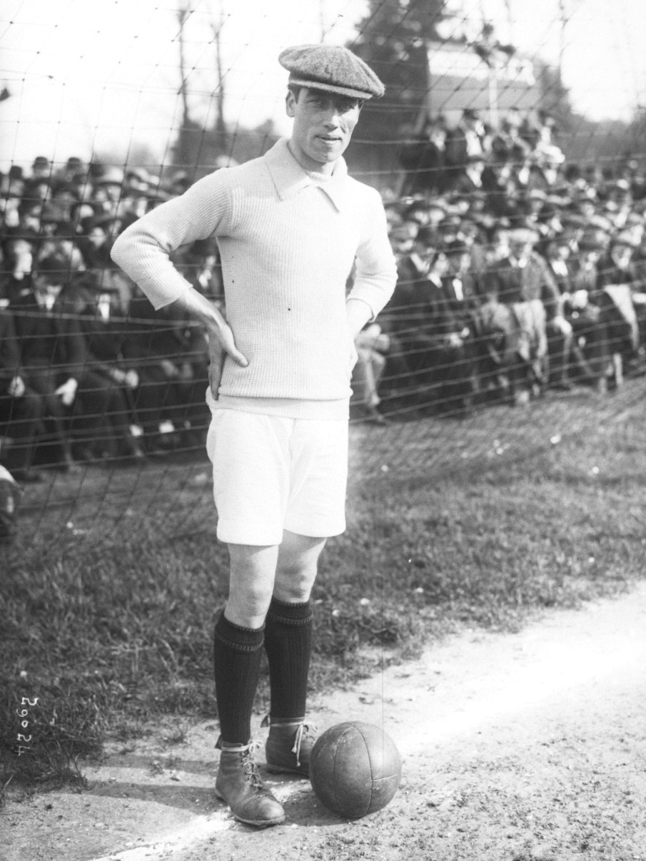 Rouen, finale du championnat de France USFSA, FC Rouen contre SH Marseille sur le terrain du Grand Trianon, photo du gardien marseillais Mac Queen.